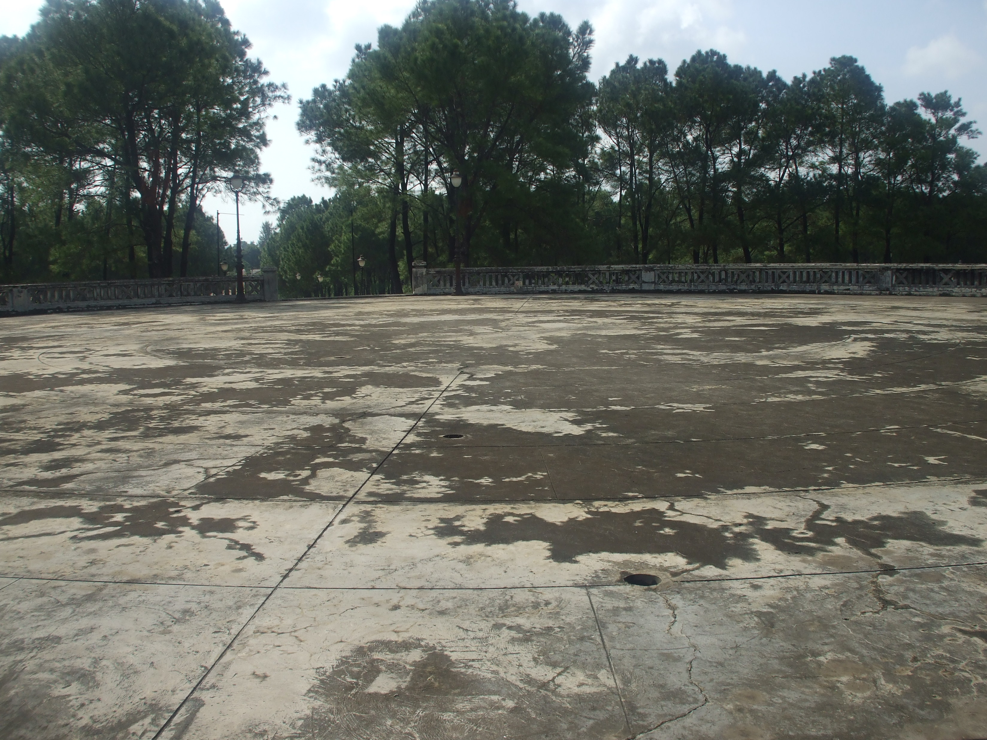 Viên Đàn (tức tầng trên cùng của hình tròn, thuộc Đàn Nam Giao Huế) tượng trưng cho trời, xung quanh có lan can quét vôi màu xanh. Trên nền Viên Đàn có lát những phiến đá Thanh được khoét lỗ tròn. Đến kỳ tế lễ, những lỗ này được dùng để cắm cột dựng lều vải màu xanh hình nón, gọi là Thanh Ốc. Theo [1]